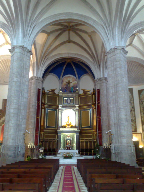 Almagro. Retablo de la Iglesia de la Madre de Dios.